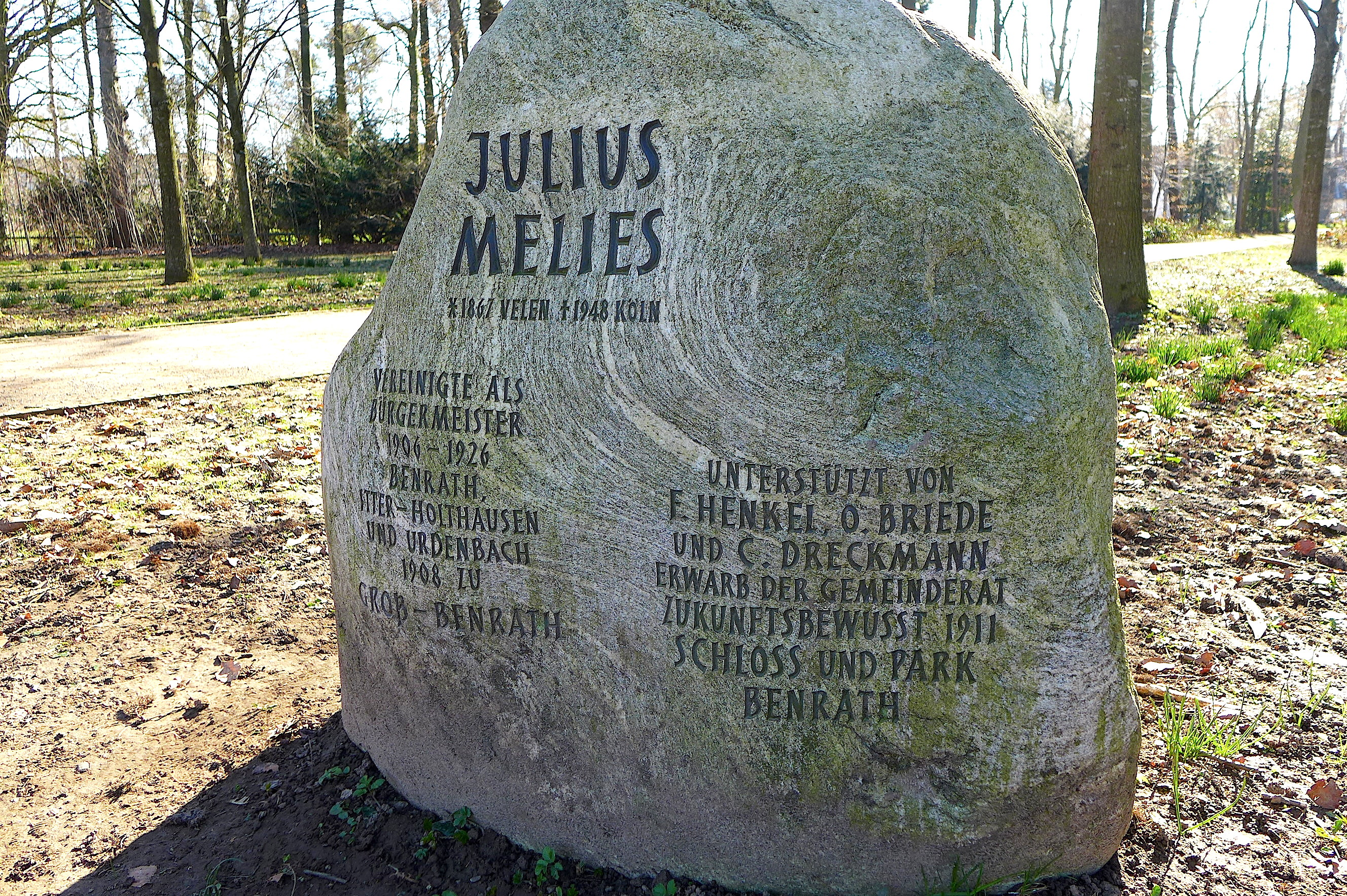 Юлий Мелиc - бургомистр Бенрата 1906-1926. Cкончался в 1948 году.